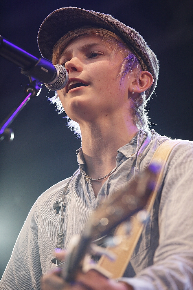 Ulrik Munther under sin spelning på Helsingborgsfestivalen 2011.